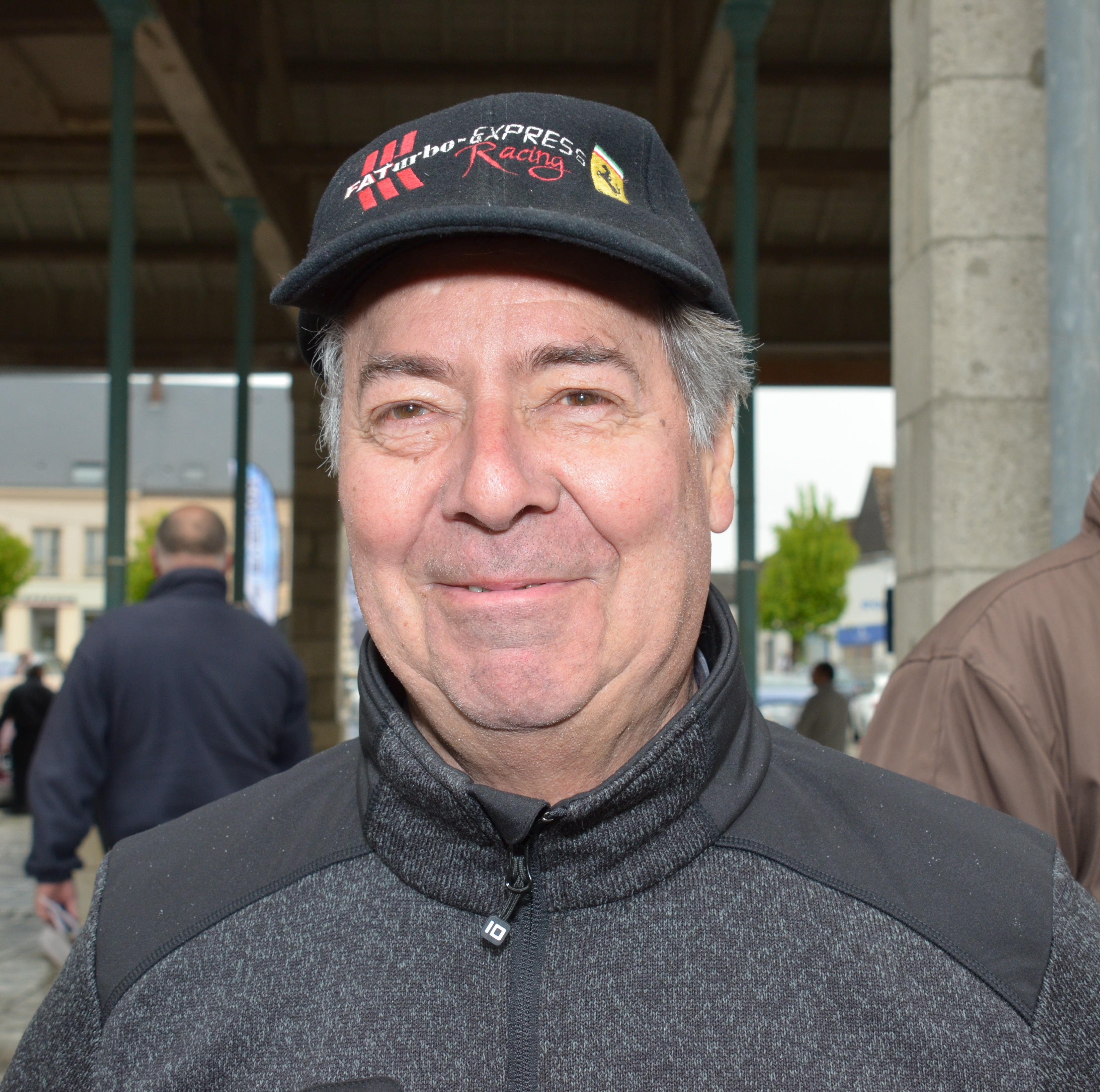 Joël Gouhier à Brou en avril 2017